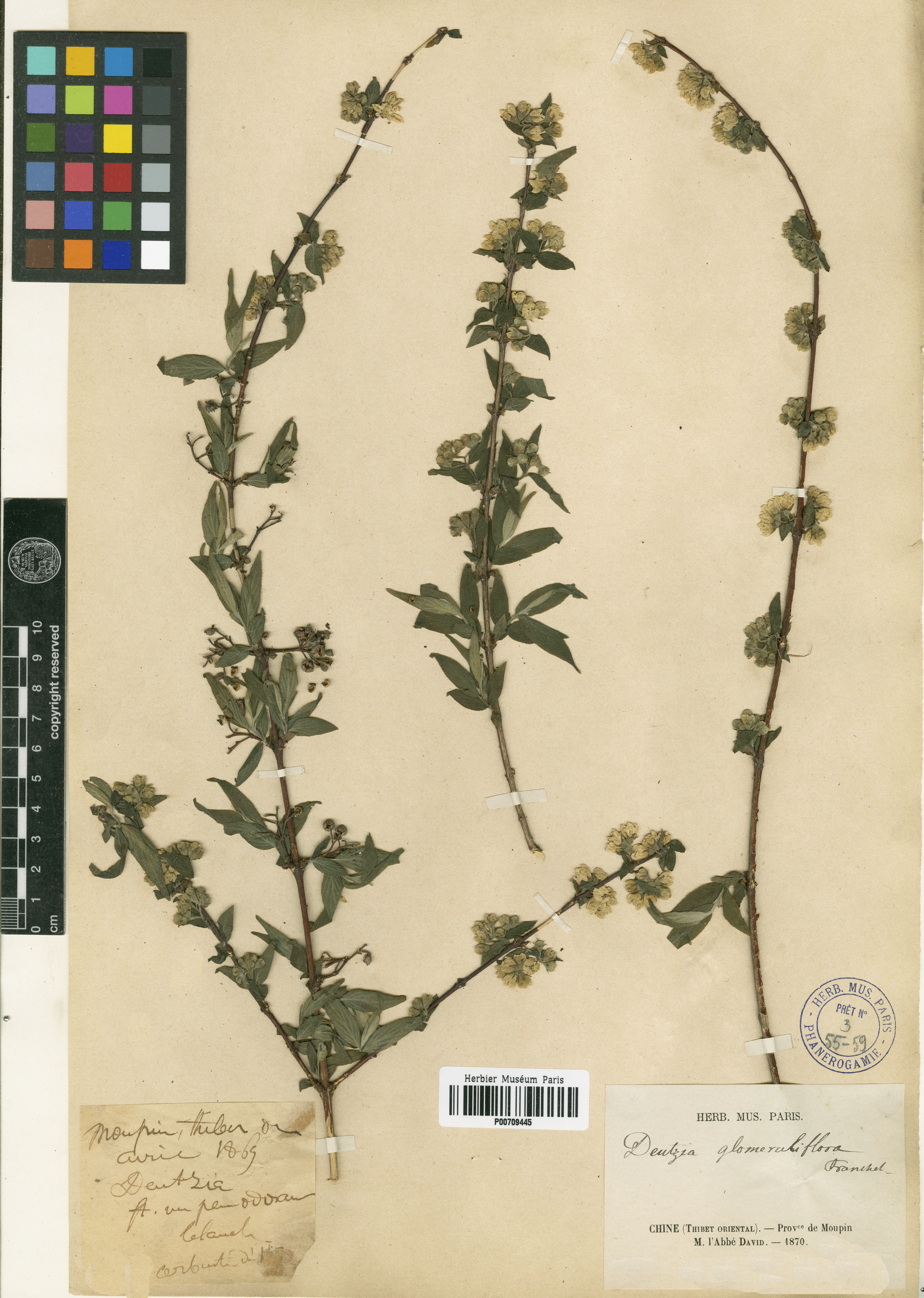 Type, Deutzia glomeruliflora, collecté en Chine